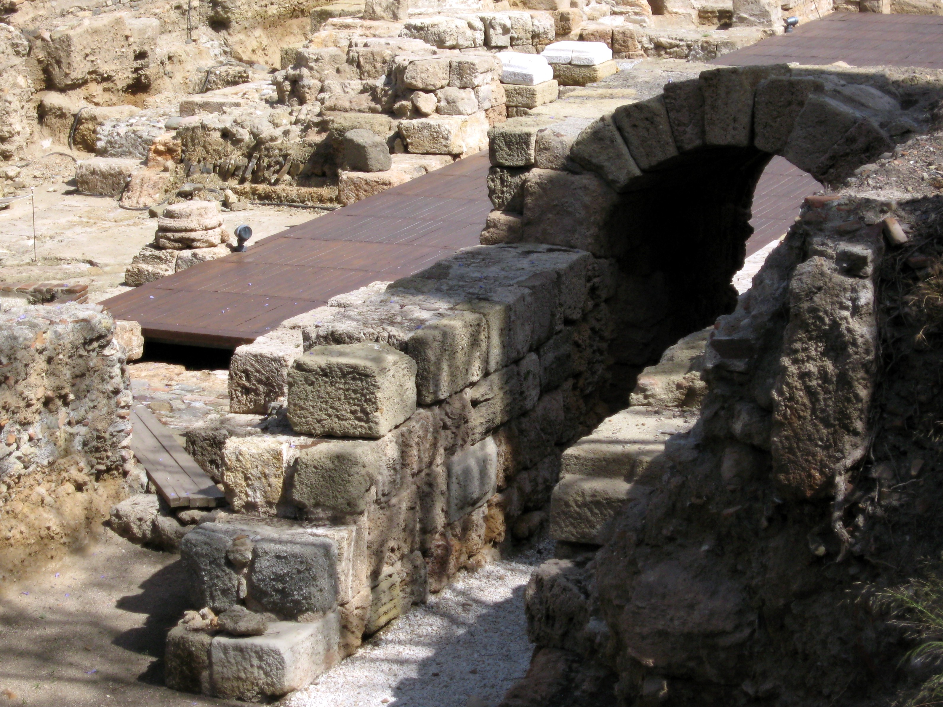 Ruinen des Römischen Theaters in Málaga, Andalusien, Spanien